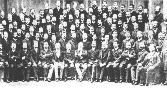 Wiener Philharmoniker at Mahler's time